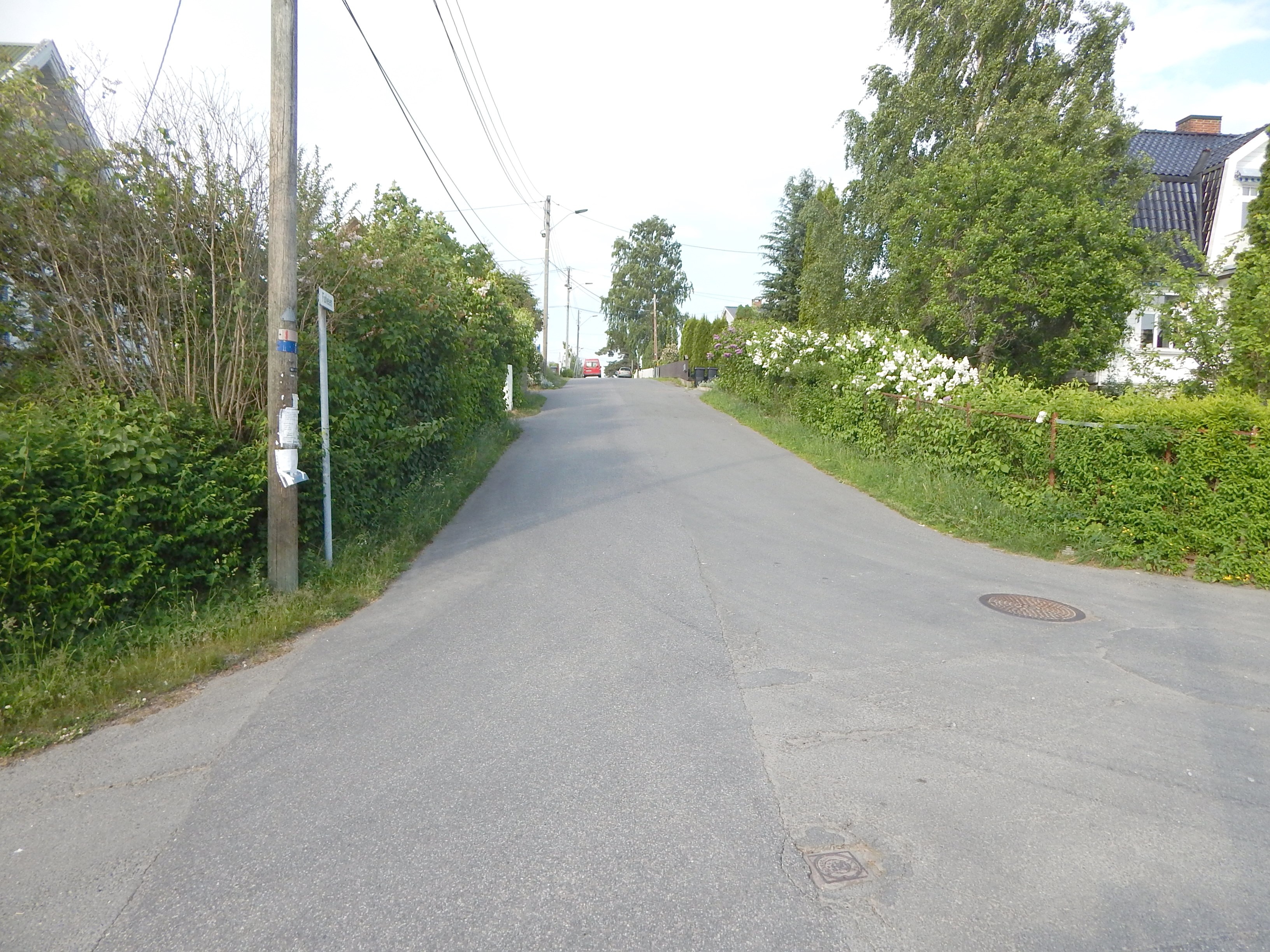 Fiolveien sett fra Dråga